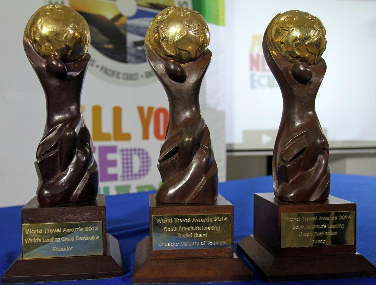 Gala de Premiación World Travel Awards 2014